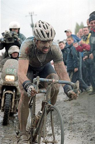 Dixième victoire en Coupe du Monde et troisième succès sur Paris-Roubaix, dans des conditions météorologiques dantesques